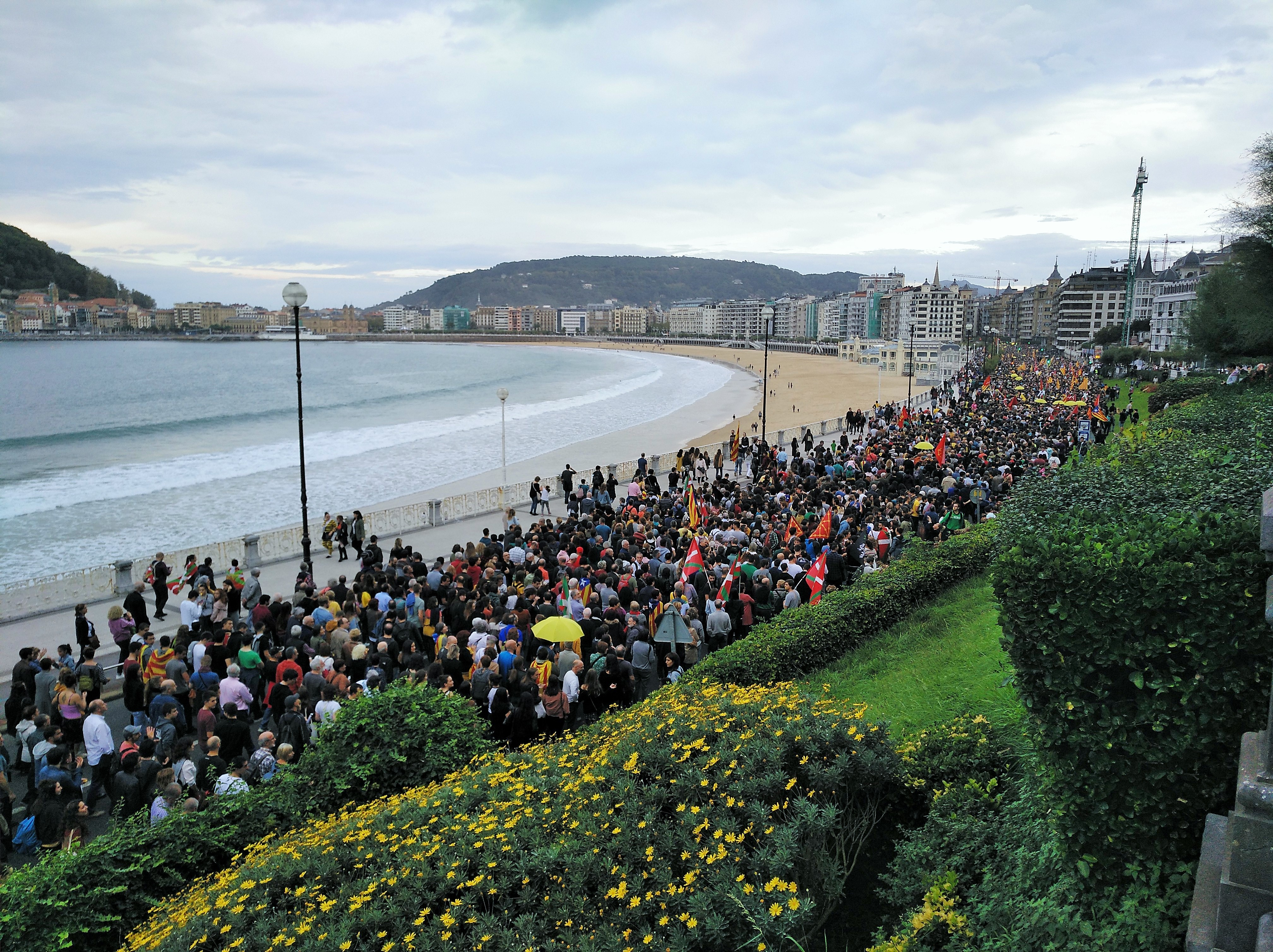 Kataluniako Generalitat eta prozesu subiranistako buruzagien kontrako epaiengatik egindako manifestazioa Donostian, Euskal Herria